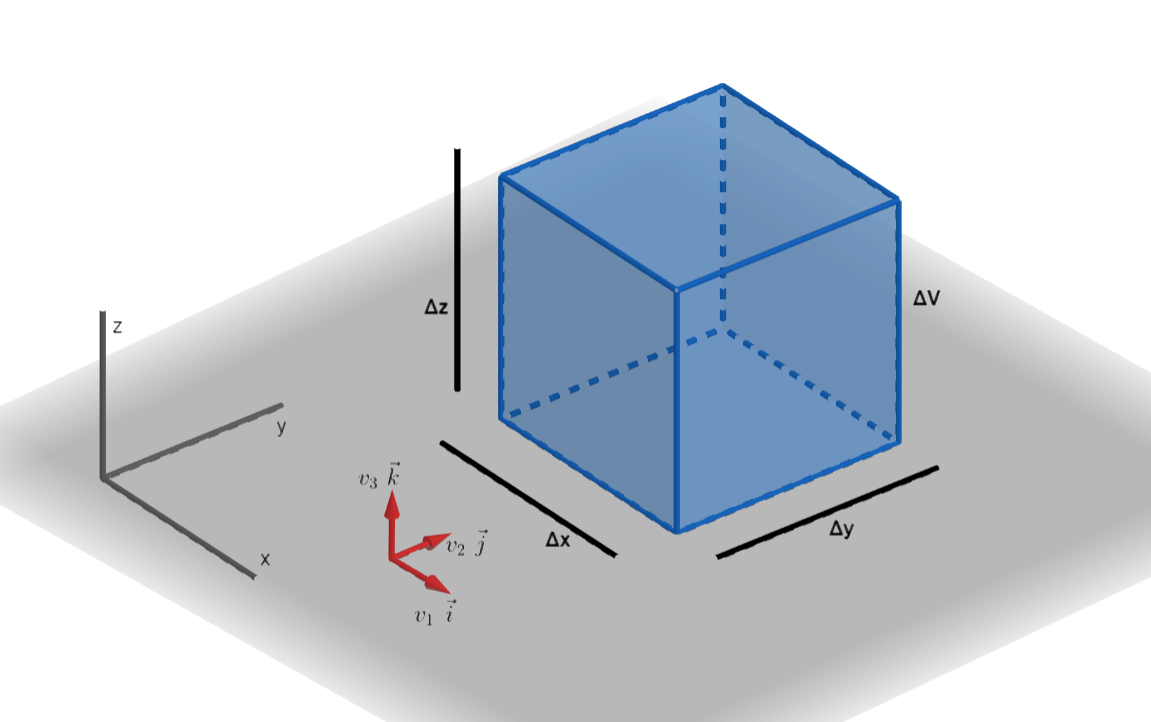 Português do Brasil: Imagem feita no software Geogebra para facilitar a compreensão ao deduzirmos a equação da continuidade.